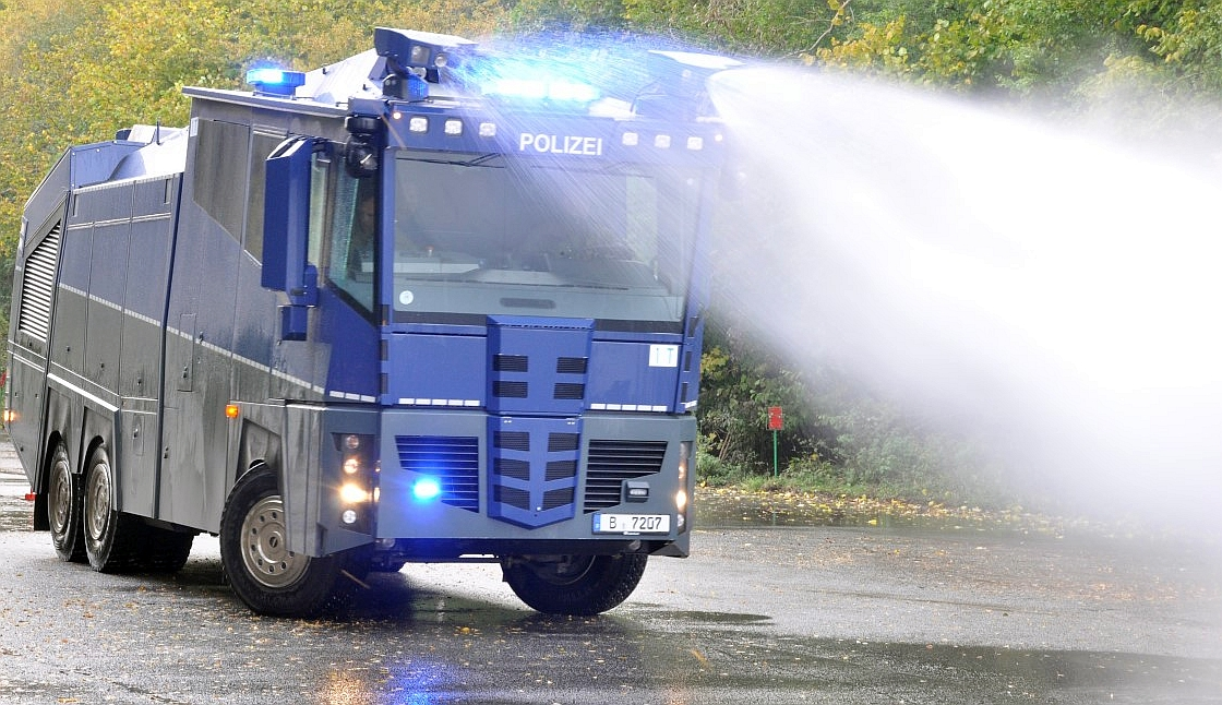 Wasserwerfer der Polizei Berlin